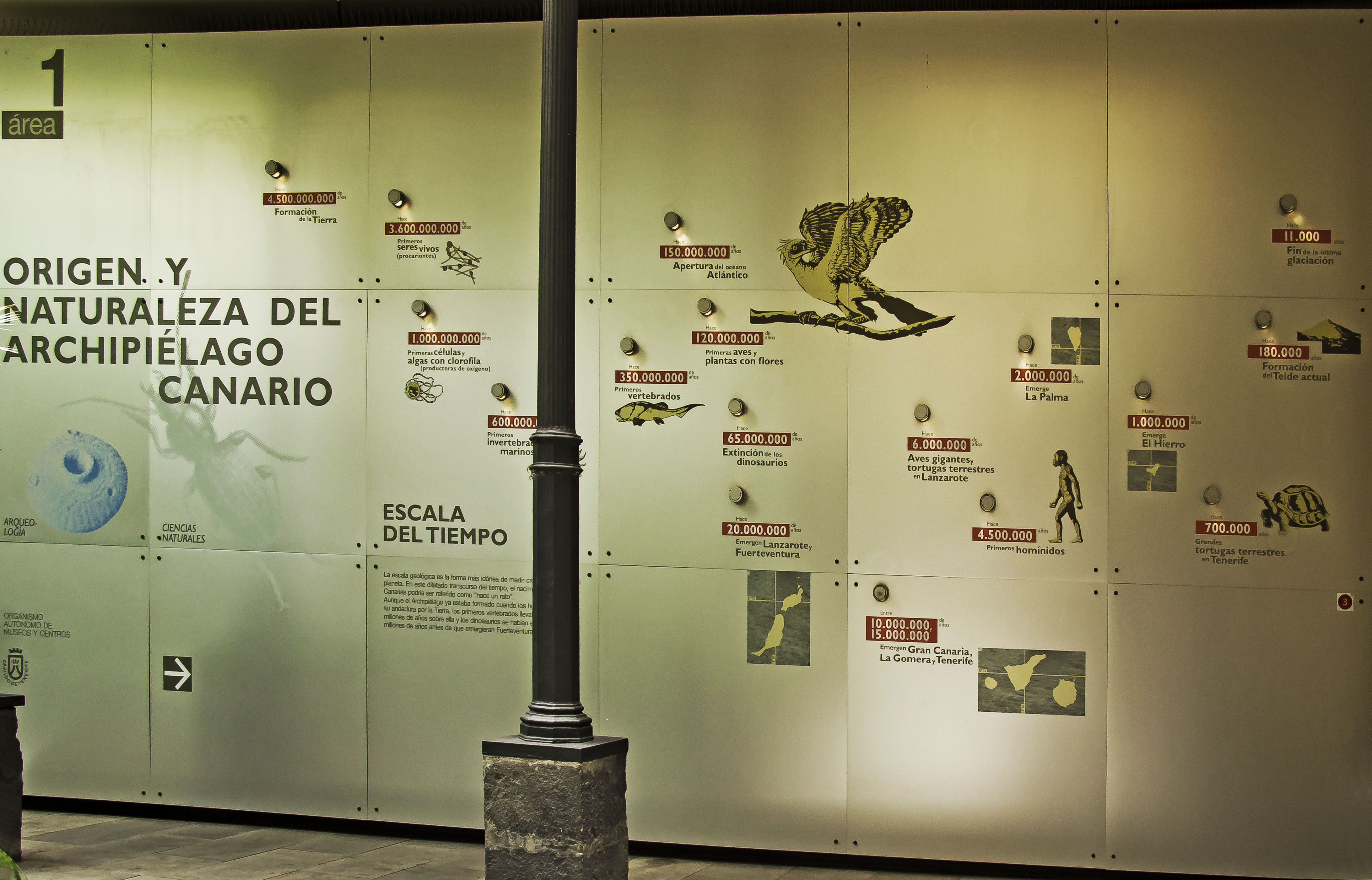 Museo de la Naturaleza y el Hombre Santa Cruz de Tenerife / Exposición Planta Baja Área 1 / Origen y Naturaleza del Archipiélago Canario / Escala del tiempo